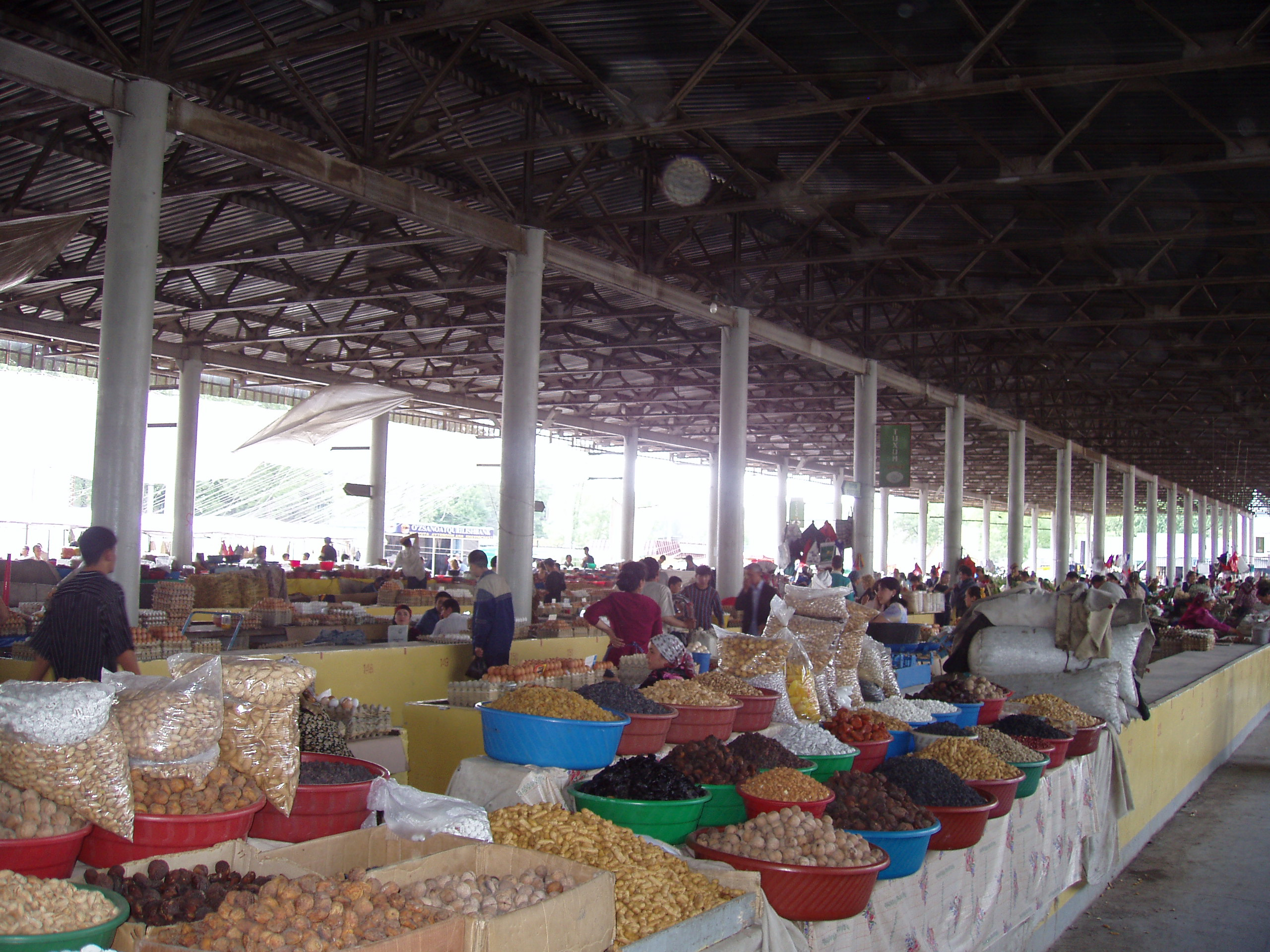 Bazar à Tachkent. Auteur : Atilin